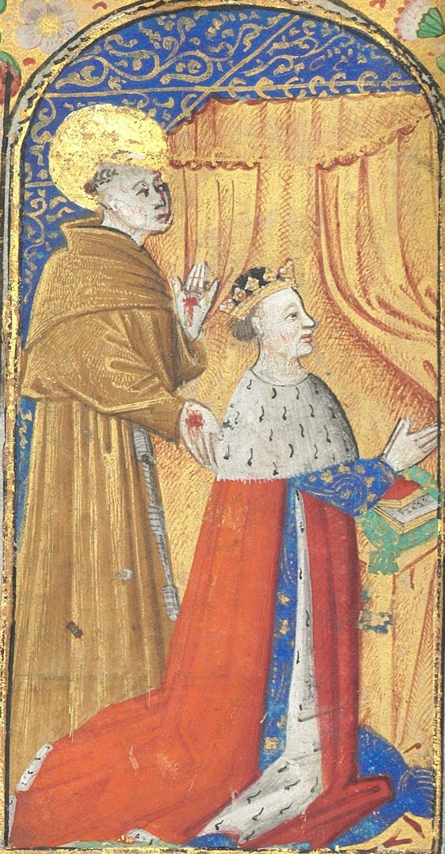 Le duc François Ier de Bretagne en prière